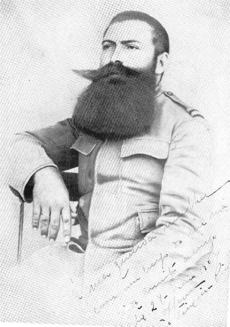 João Teixeira Pinto (1876-1917)